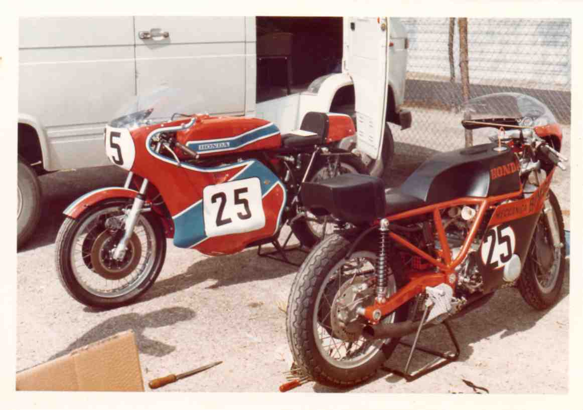 La première Bimota HB1, sur le circuit d'Imola en 1973